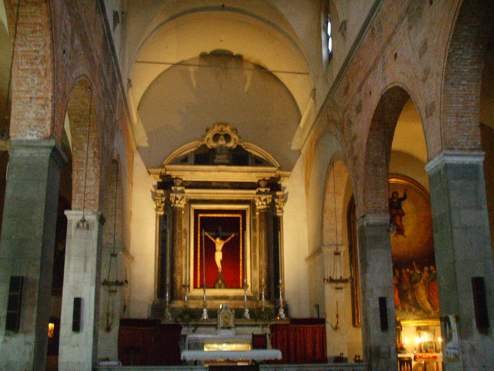 Chiesa di san salvatore, lucca 06 interno